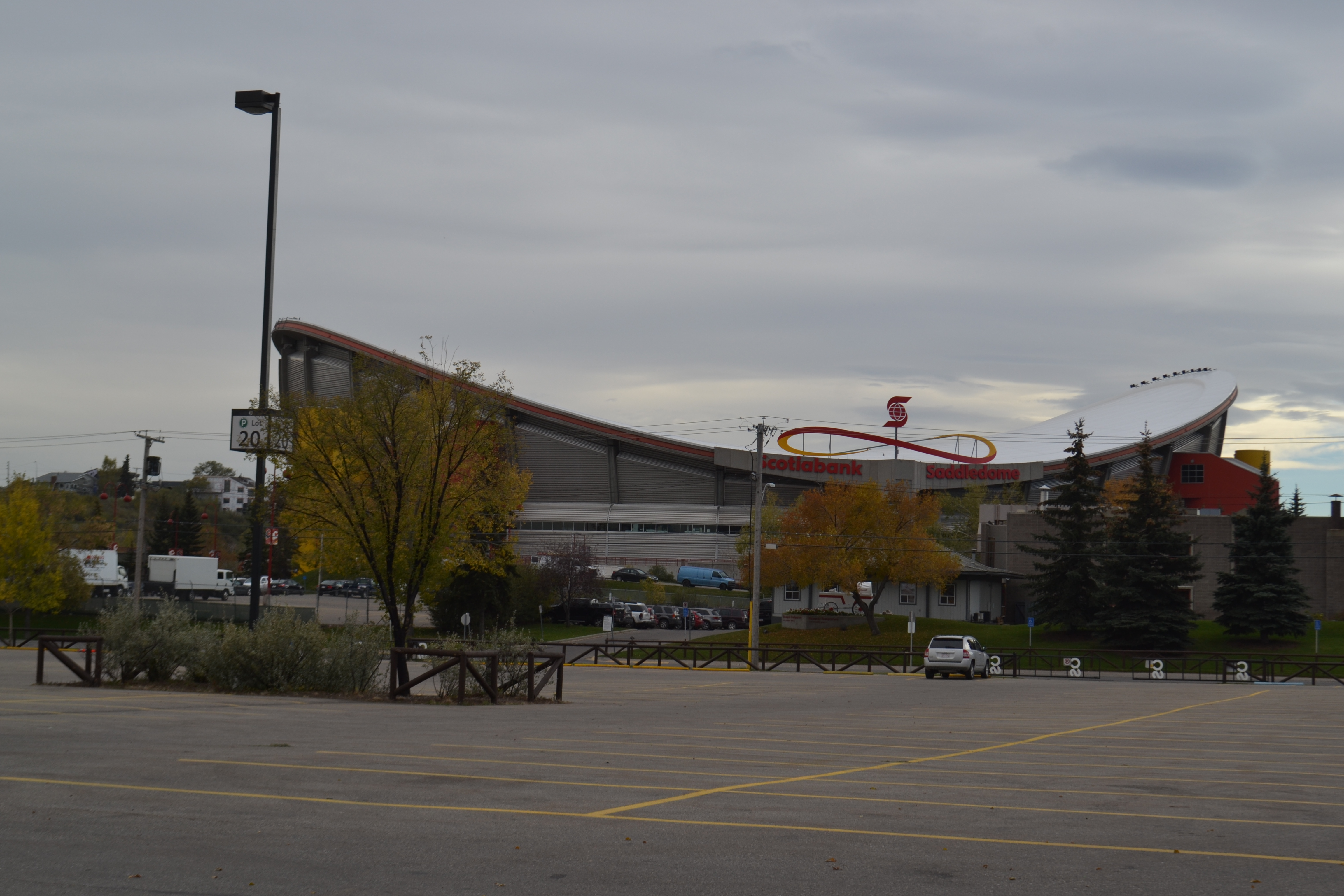 SaddleDome